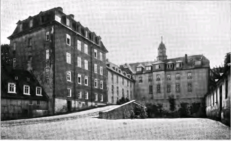 Schloss Wittgenstein aus: Die Bau- und Kunstdenkmäler von Westfalen: Band 12: Kreis Siegen. Münster i.W.: Schöningh, 1903